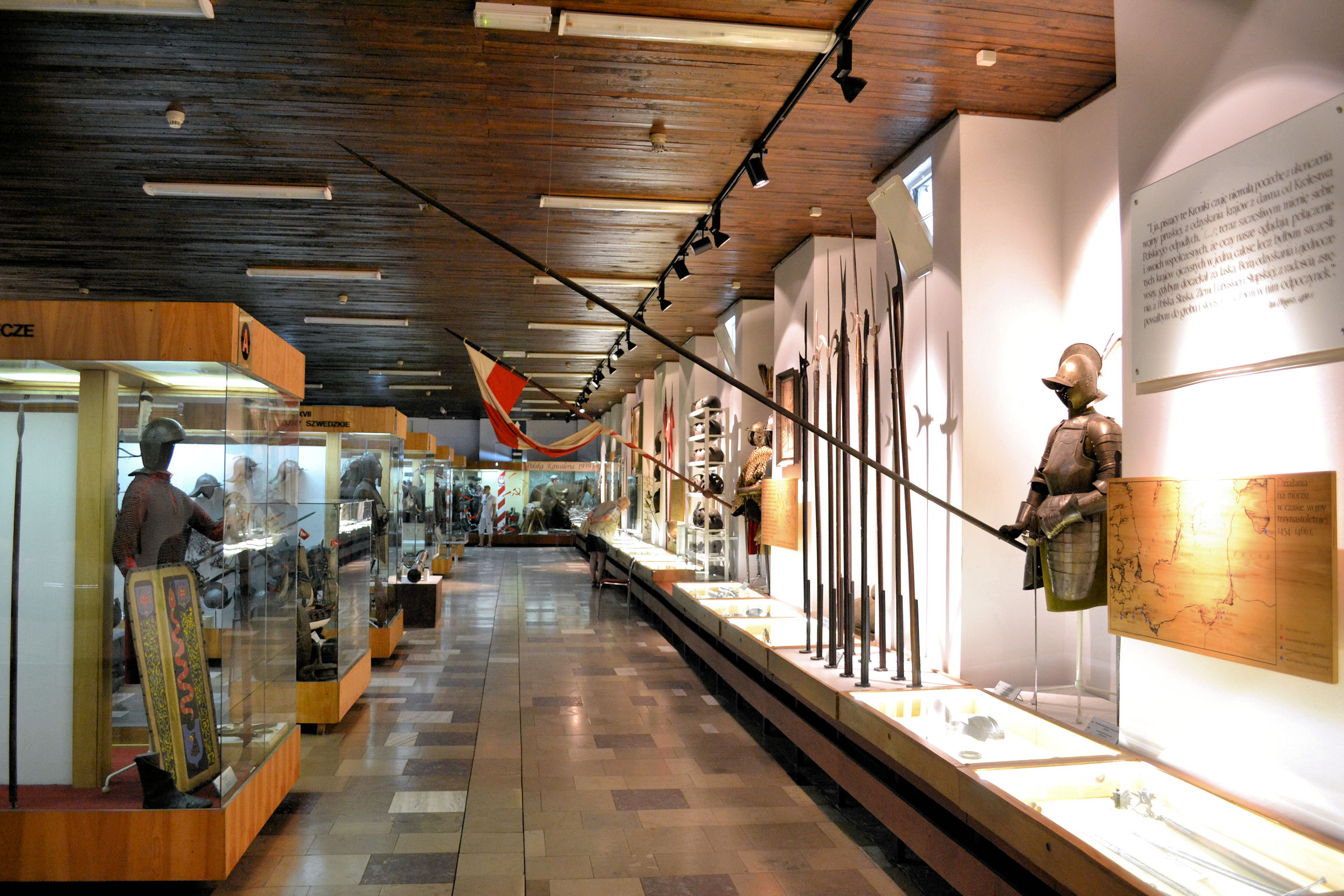 Muzeum Oręża Polskiego w Kołobrzegu